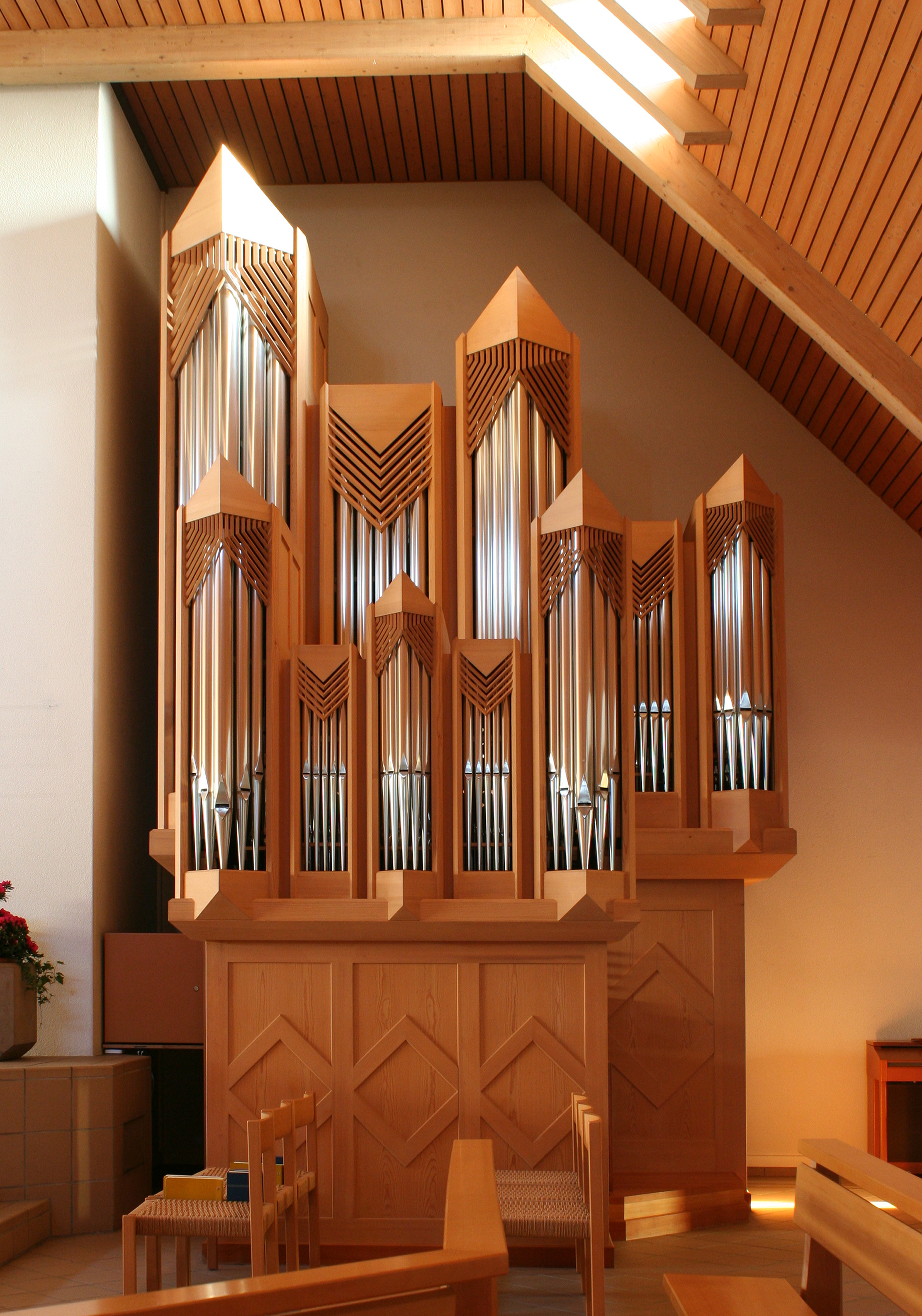 Römisch-katholische Pfarrkirche St. Martin Illnau-Effretikon, Orgel